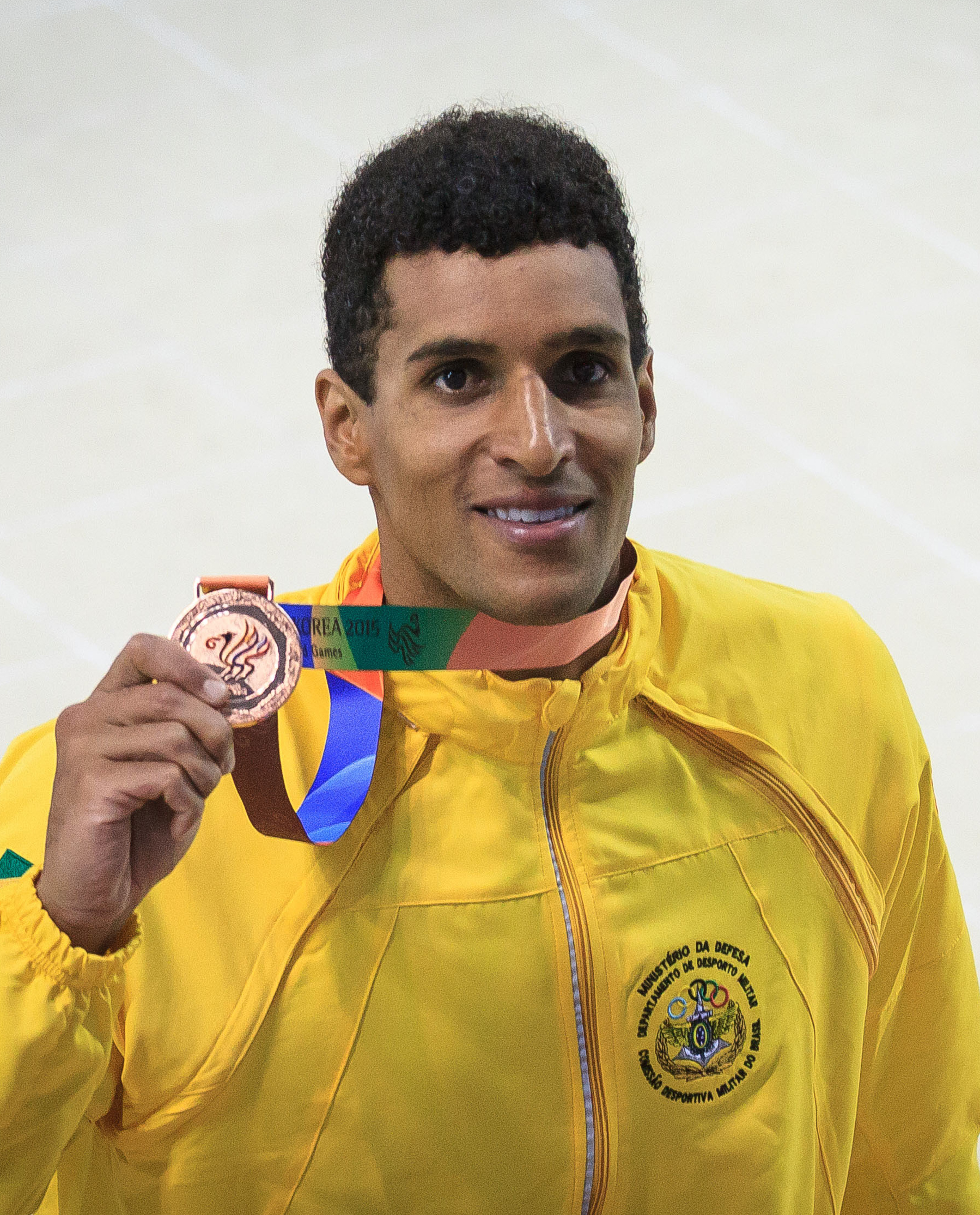 Bronze para Nicola Nilo Cesar de Oliveira nos 100m livre da natação em Gimcheon pelos 6º Jogos Mundiais Militares. Foto: Sgt Johnson Barros